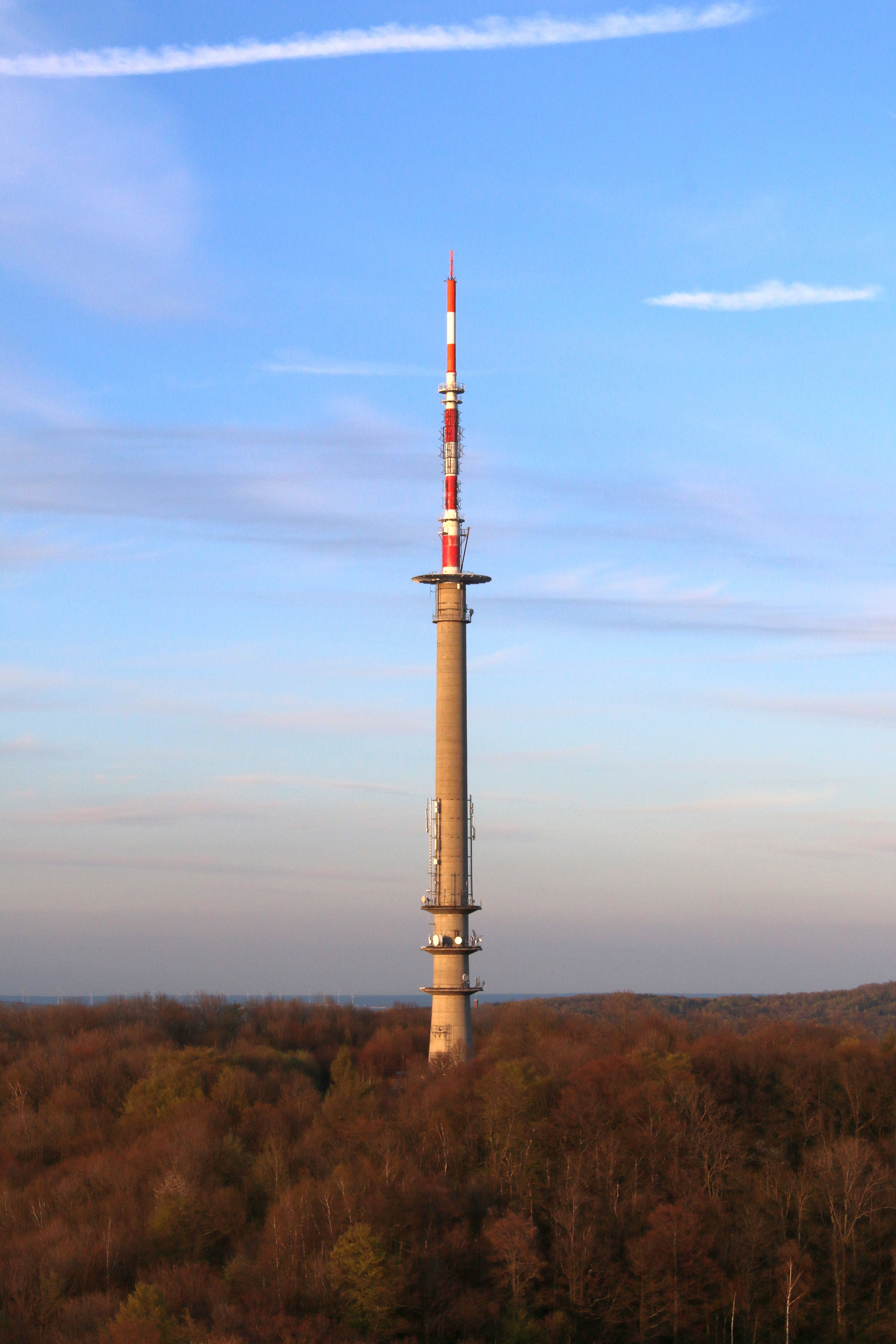 Fernsehturm auf dem Schafberg (Löbauer Berg); Blick vom König-Friedrich-August-Turm